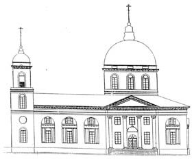 Чертеж Свято Успенского храма в Аксае начала XX века.